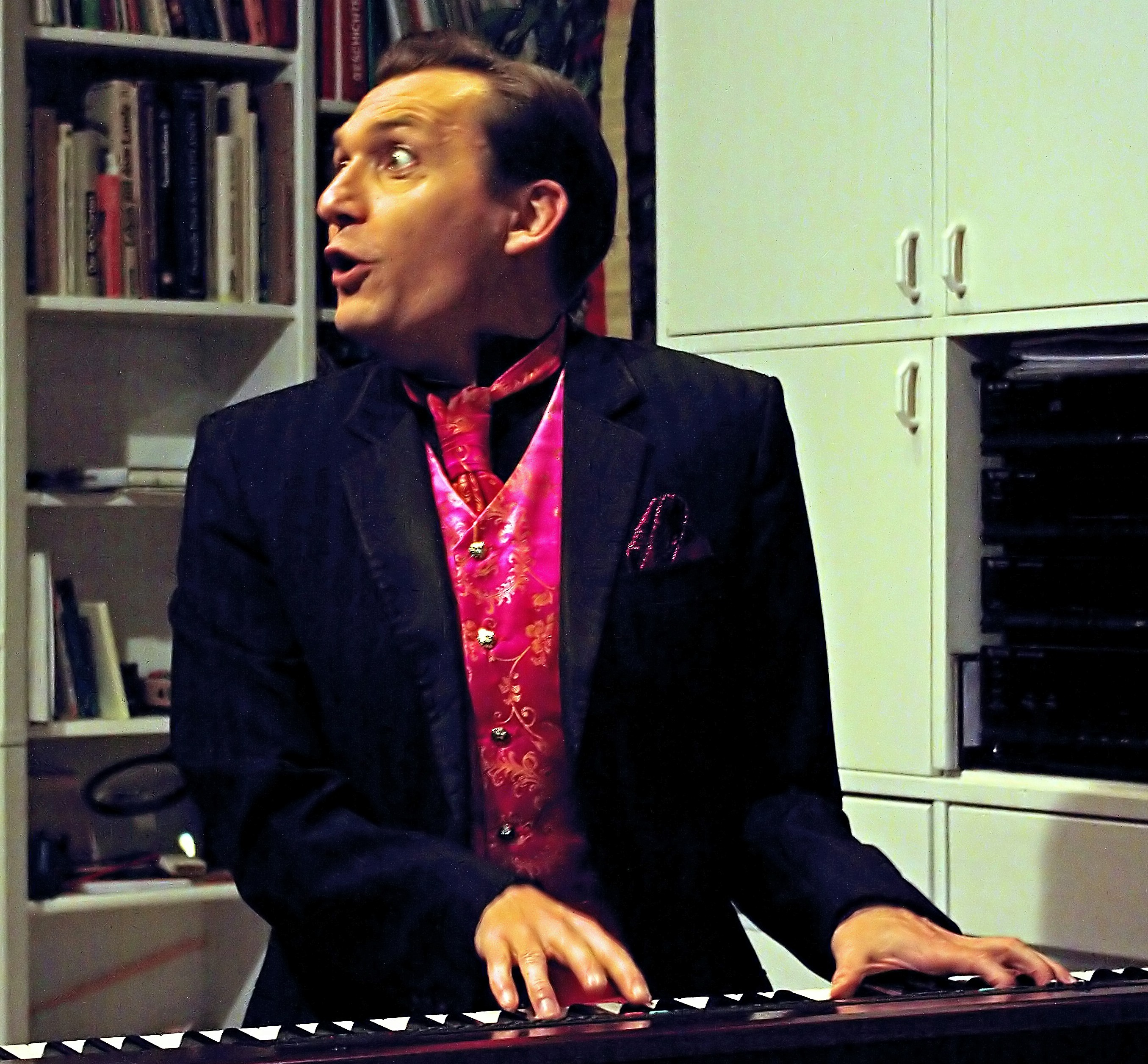 Markus Schimpp, Pianist, Sänger und Varieté-Künstler, bei einem Auftritt im April 2012